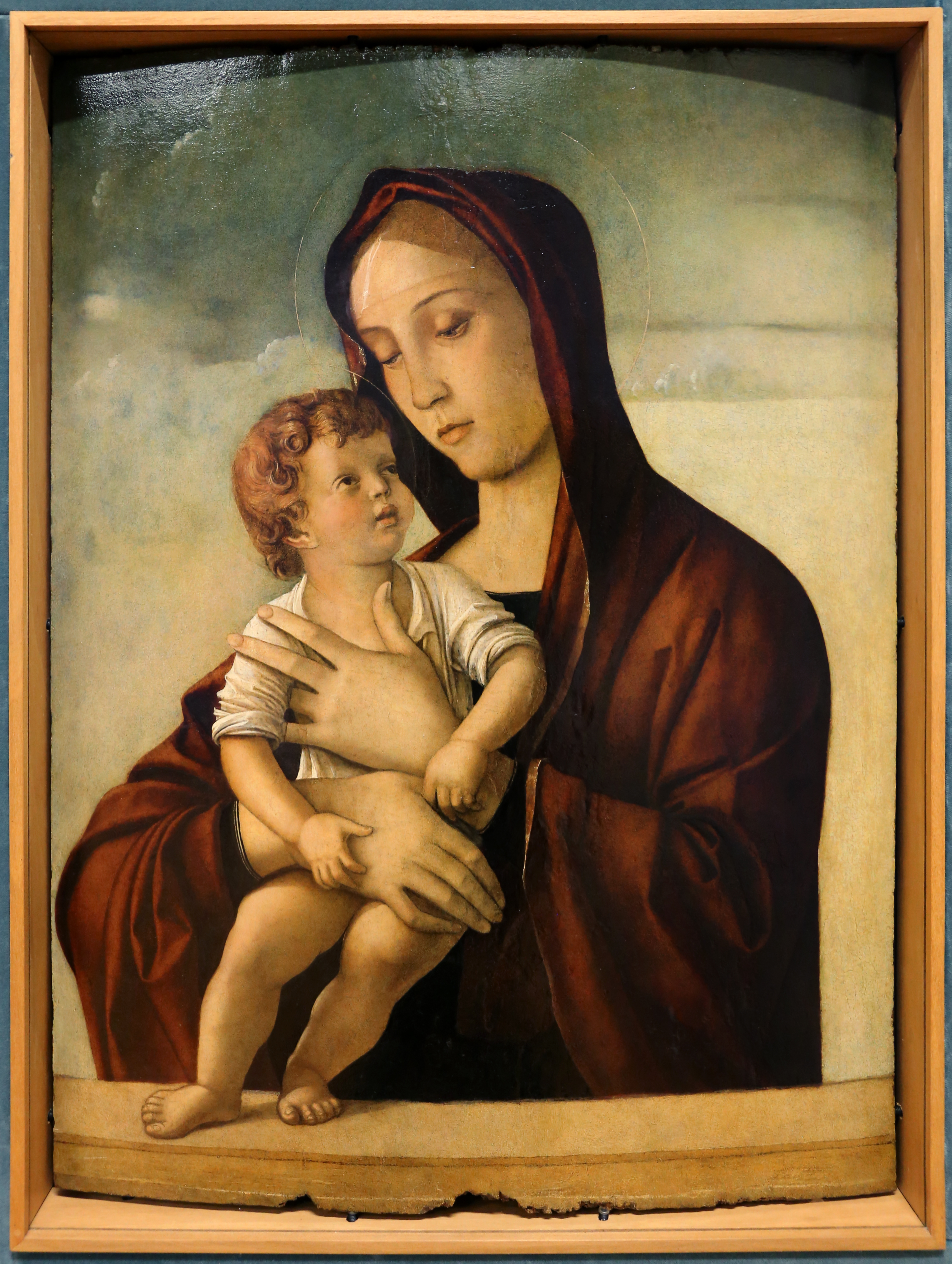 Museo di Castelvecchio This is a photo of a monument which is part of cultural heritage of Italy.